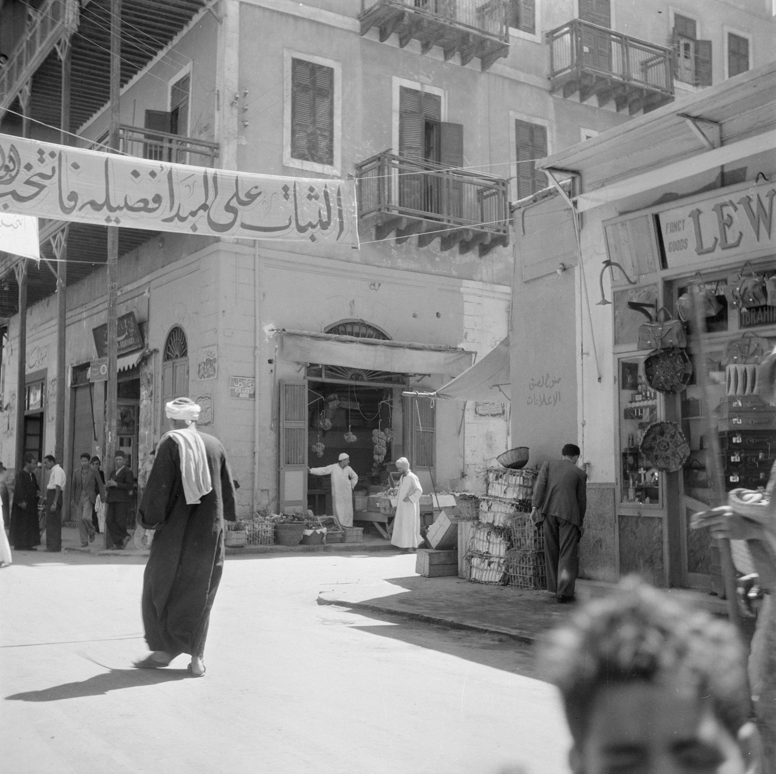 Collectie / Archief : Fotocollectie Van de Poll Reportage / Serie : Midden-Oosten 1950-1955: Egypte Beschrijving : In de suq van Suez Datum : 1950 Locatie : Egypte, Suez Trefwoorden : spandoeken, straatbeelden Fotograaf : Poll, Willem van de Auteursrechthebbende : Nationaal Archief Materiaalsoort : Negatief (zwart/wit) Nummer archiefinventaris : bekijk toegang 2.24.14.02 Bestanddeelnummer : 255-6628